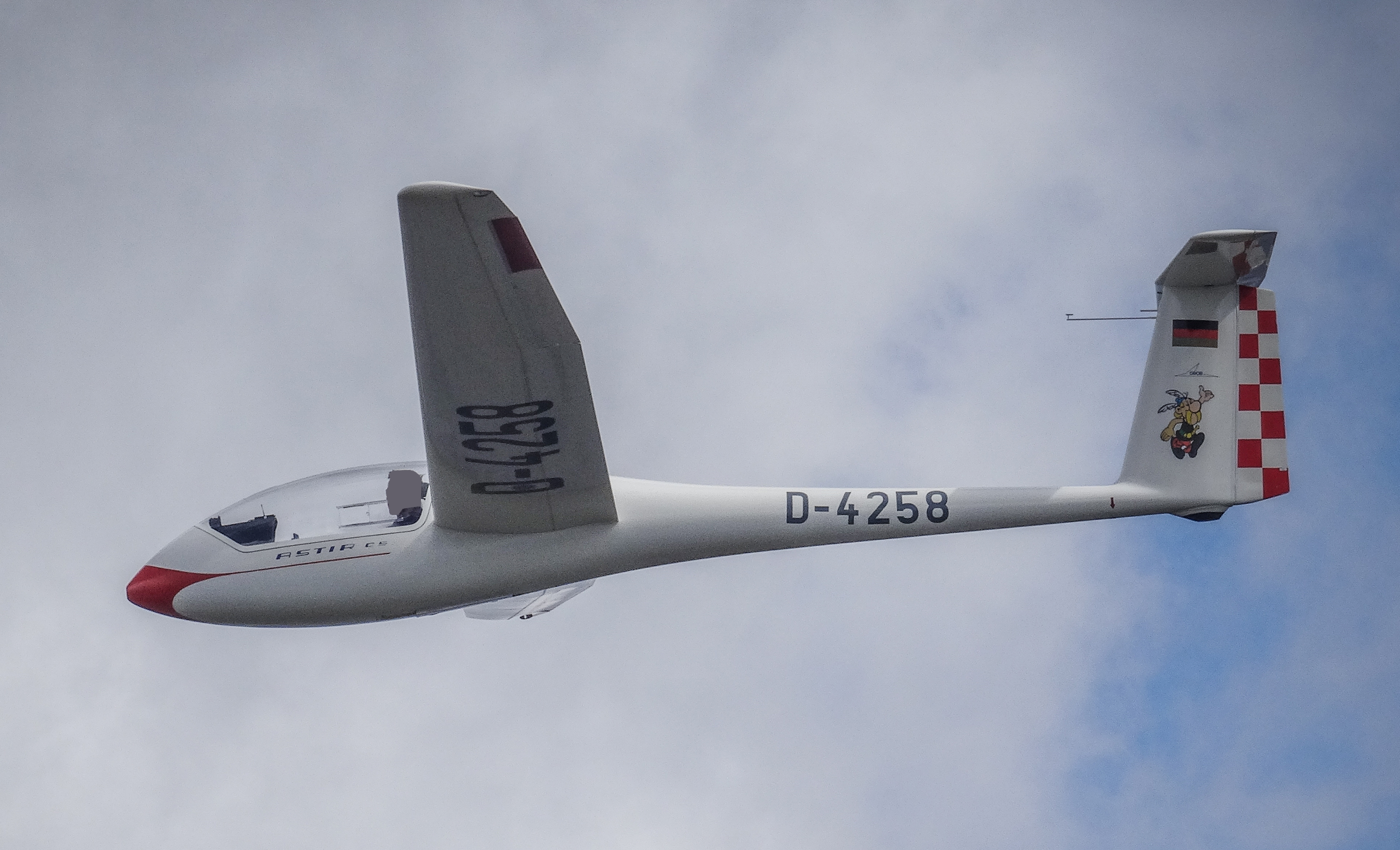 Grob Astir CS in der Luft